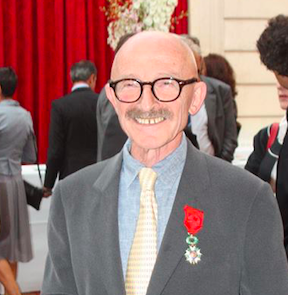 Pierre Weill lors de sa remise de l'ordre de grand officier de la légion d'honneur à Paris